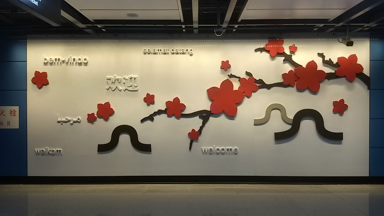 粵語: 喺機場北站站廳嗰邊嘅文化牆